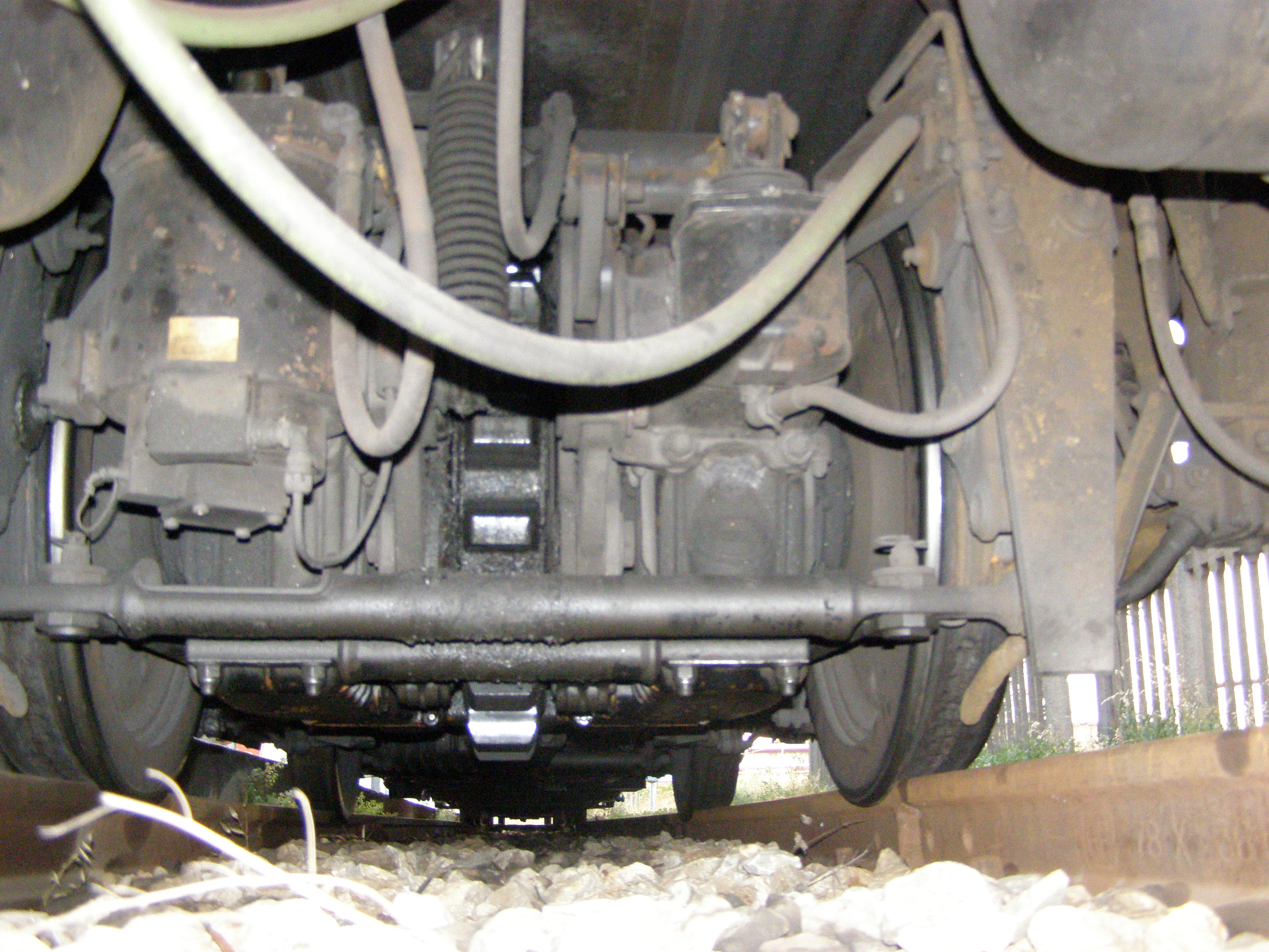 Sistema a cremagliera di una M4c